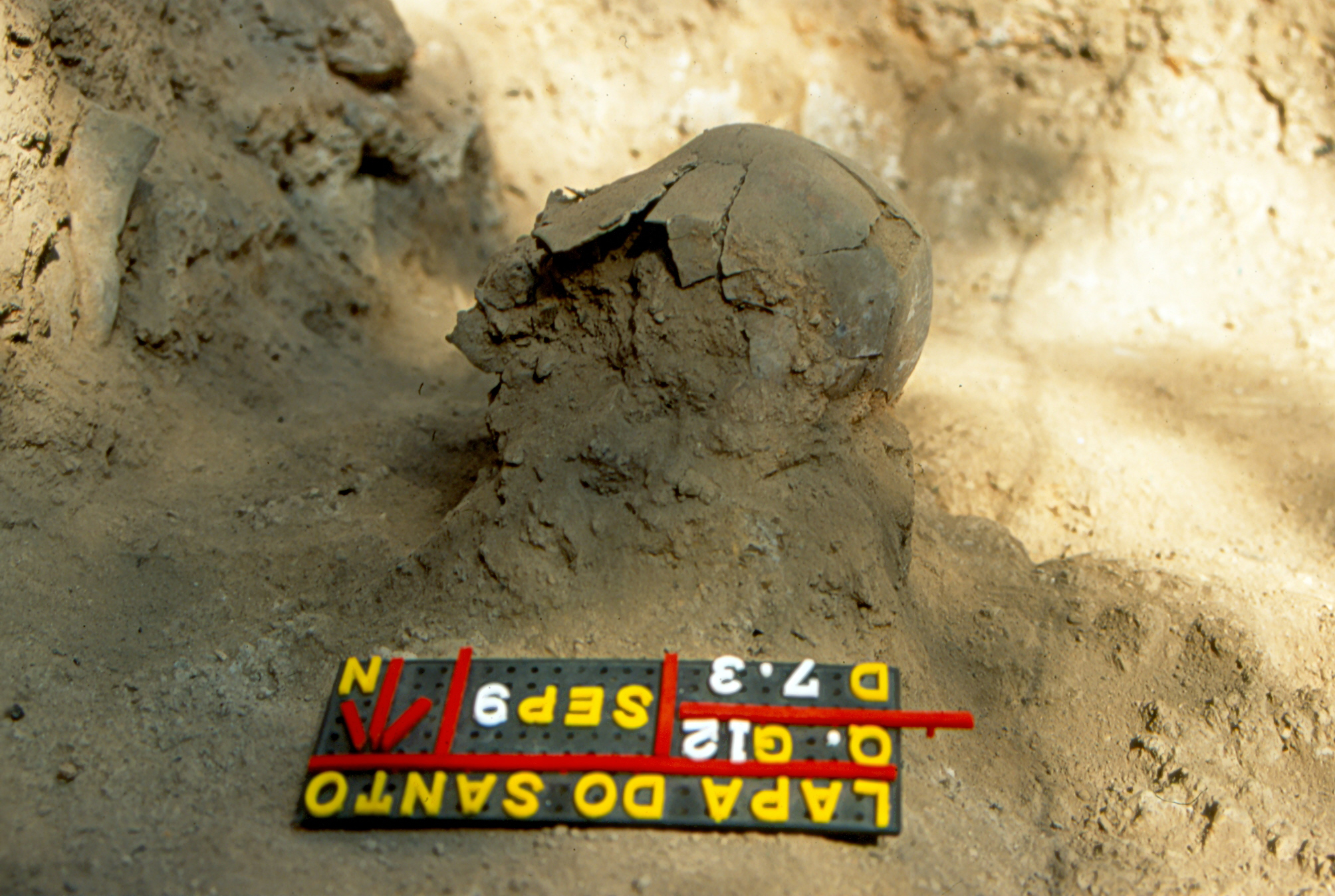 Lapa do Santo - Sepultamento 09 - Foto de campo durante escavação do sepultamento. A Lapa do Santo é um sítio arqueológico localizado na região de Lagoa Santa em Minas Gerais. Apresenta um rico registro da cultura material dos grupos que habitaram o Brasil central durante Holoceno Inicial, Médio e Final. Dezenas de sepultamentos humanos foram encontrados na Lapa do Santo. Nessa imagem é possível visualizar o crânio do Sepultamento 9 durante a escavação do mesmo em julho de 2002. Esse sepultamento é composto por um único indivíduo subadulto do qual estavam presentes o crânio, a mandíbula, poucos fragmentos de costelas e partes da bacia. O neurocrânio foi encontrado repousando sobre seu lado esquerdo , com a face ligeiramente inclinada para baixo e voltada para o norte. O neurocrânio estava completamente preenchido por sedimento (conforme pode ser visualizado neste imagem). Os demais ossos estavam próximos ao neurocrânio. Os ossos da bacia, o temporal e a mandíbula estavam unidos por concreção. Ainda que apenas o neurocrânio tenha se preservado integralmente, os ossos do maxilar, os da base do crânio, e a mandíbula também estavam presentes. Os alvéolos da mandíbula e do maxilar estavam vazios, com exceção dos primeiros molares permanentes e de alguns germes de dentes permanentes.